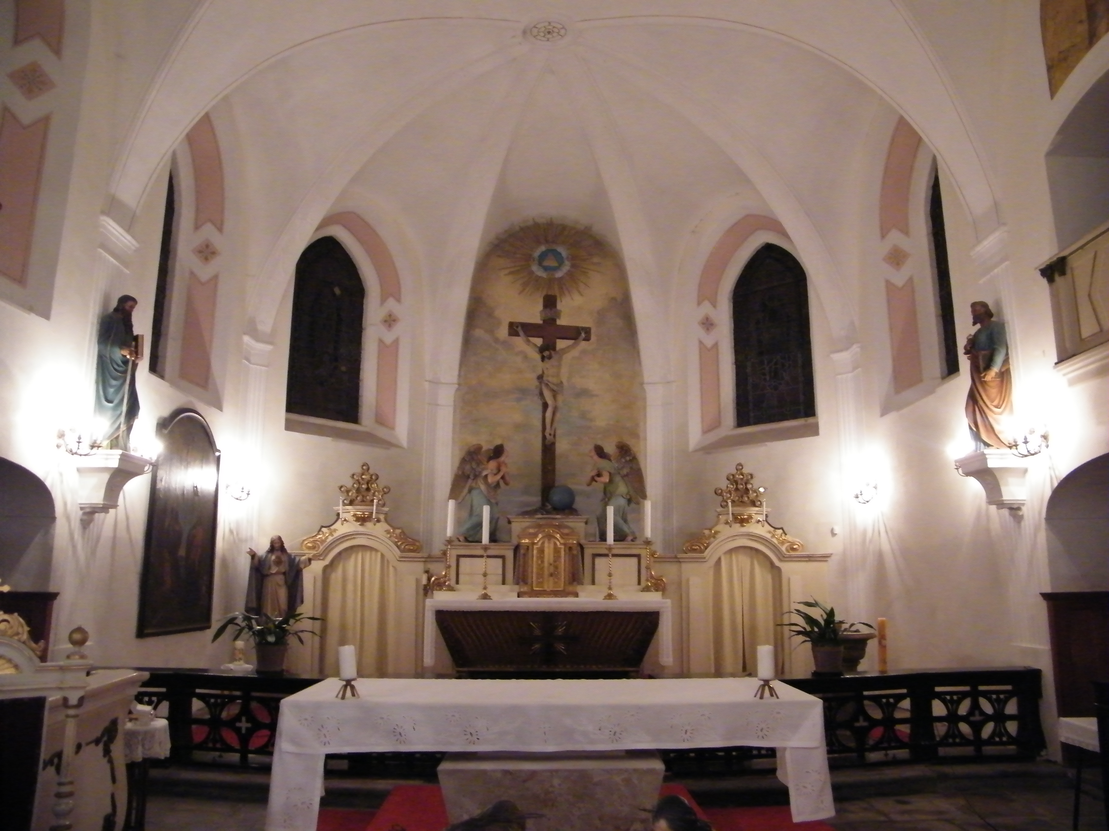 Kostel svatého Šimona a Judy v Lipové, presbytář